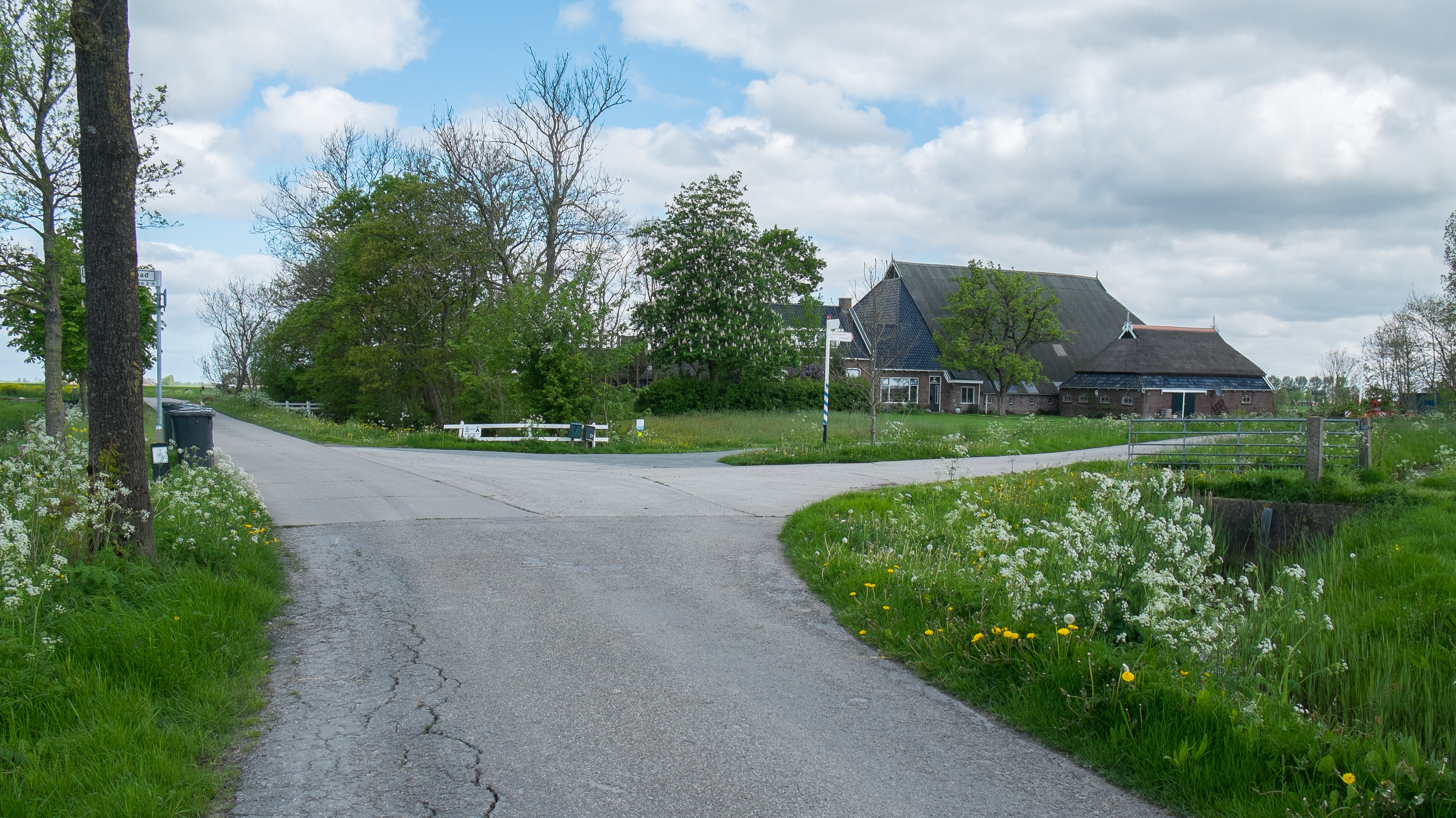 Boerderij in het gehucht De Keegen